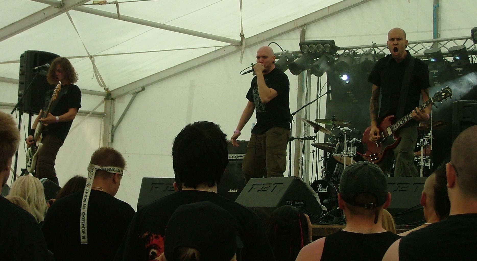 Finnische Grindcore-Band Rotten Sound beim Kuopio Rockcock